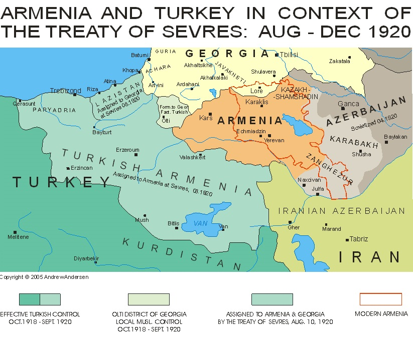 Η περιοχή που απεικονίζεται με πορτοκαλί χρώμα ήταν επίσημα αναγνωρισμένη ως τμήμα της επικράτειας της Δημοκρατίας της Αρμενίας, επικυρωμένη με την Συνθήκη του Μπατούμ. Οι κόκκινη περίμετρος υποδηλώνει τα σημερινά σύνορα της Δημοκρατίας της Αρμενίας.